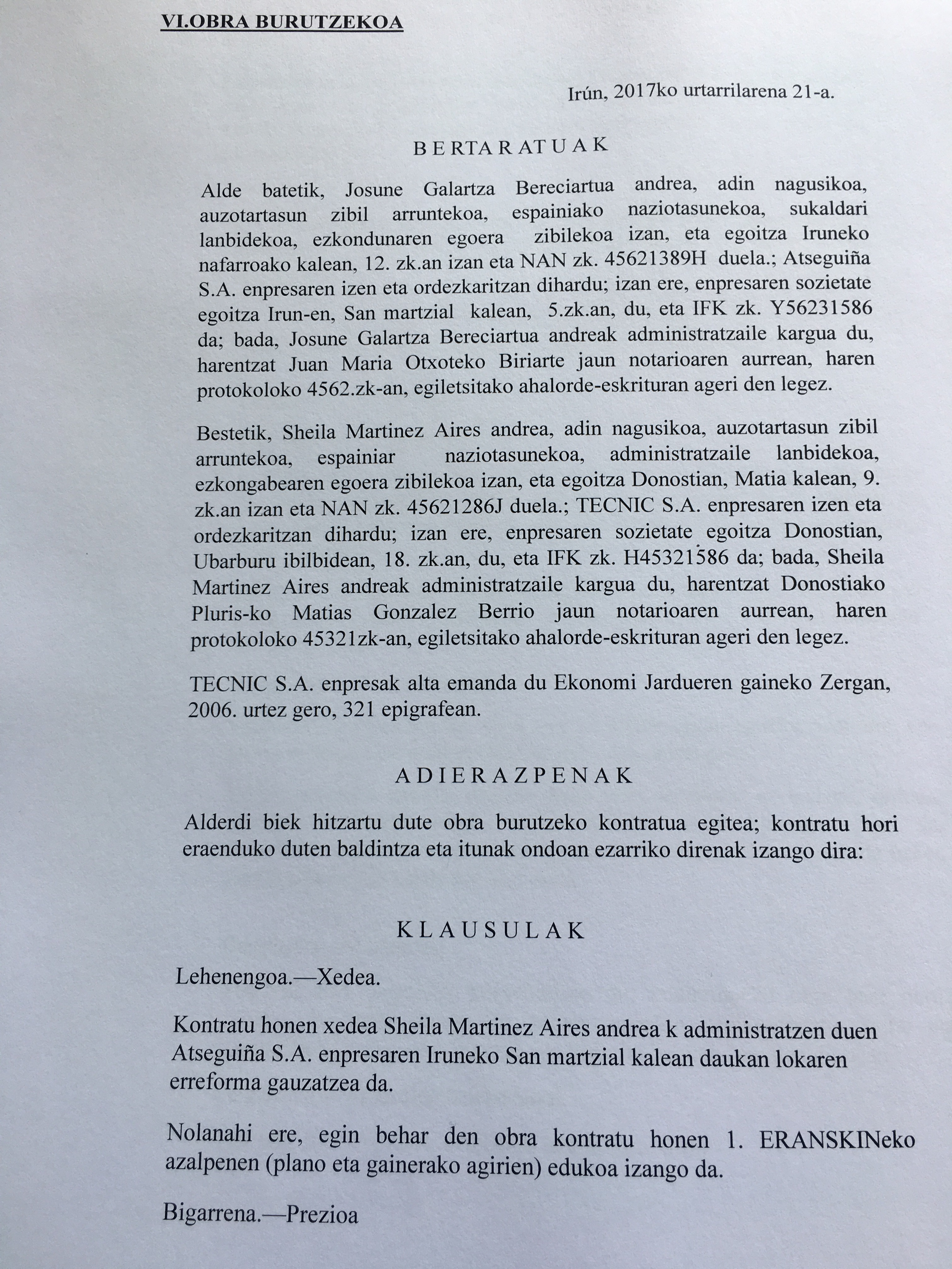 Obra Kontratuaren eredua